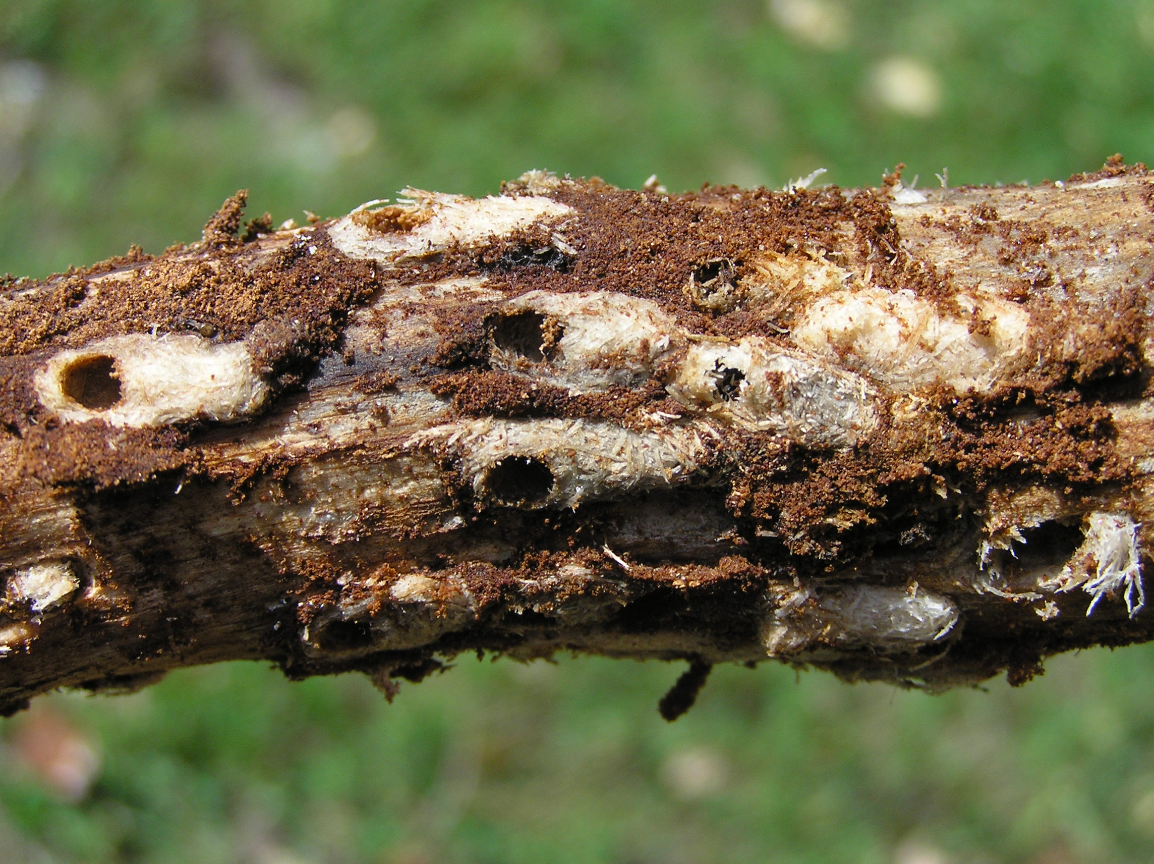 Pissodes notatus Pissodes castaneus, smolik znaczony, Polska